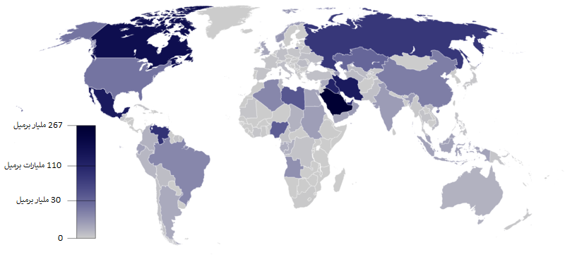 خريطة العالم توضح نسب احتياطي النفط في العالم وفقًا لمنظمة أوبك، كانون الثاني (يناير) 2014.